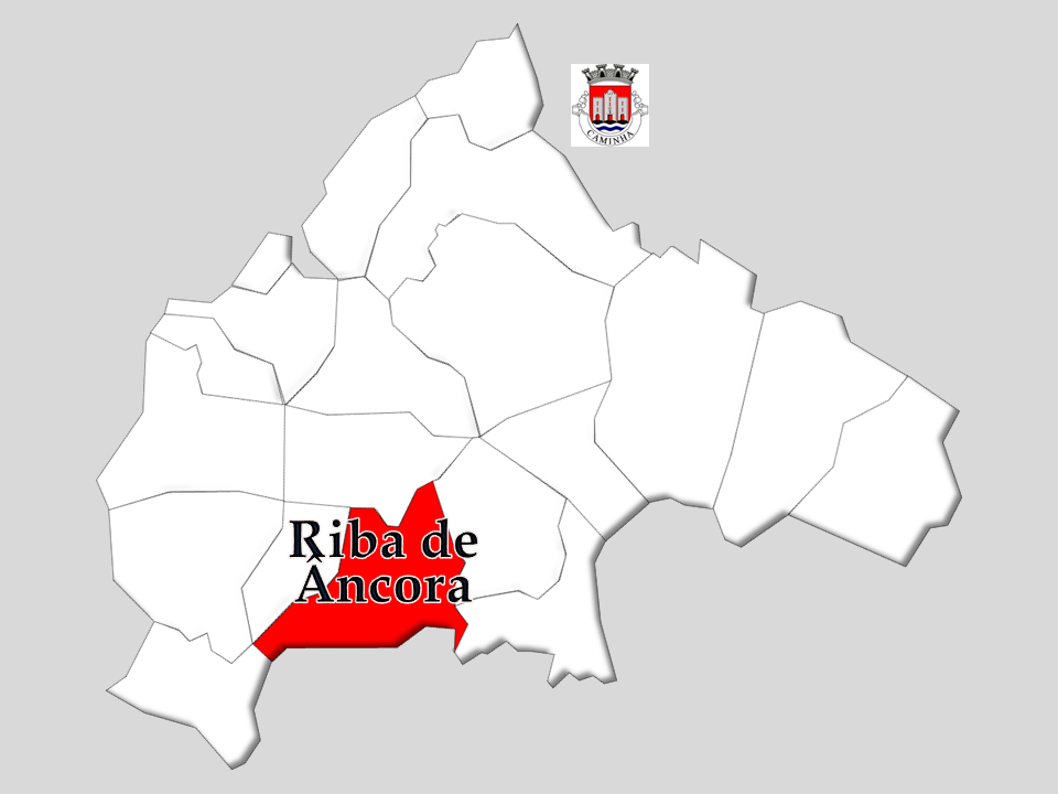 Censos 1864/2011